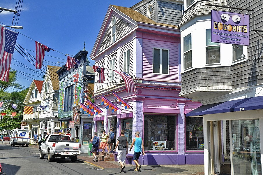 Commercial Street, Hauptachse in Provincetown